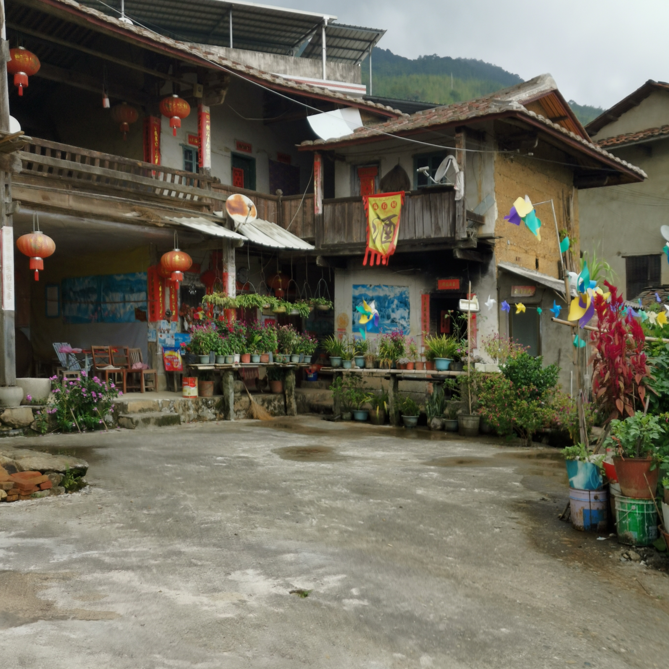 中文（中国大陆）: 高石村